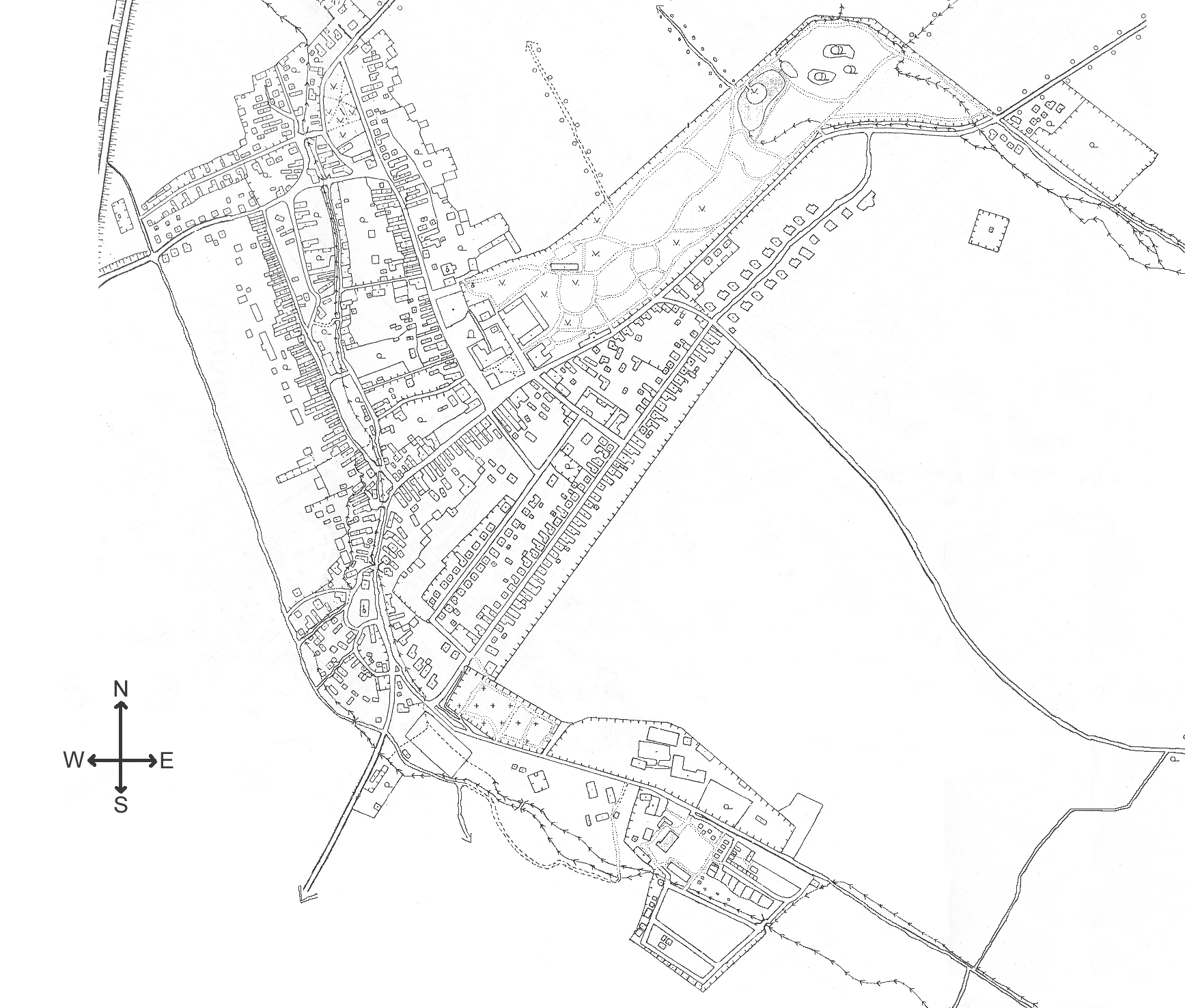 The map of Mošovce (Slovakia)